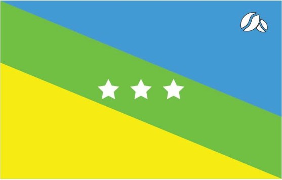 Bandera Bolivar